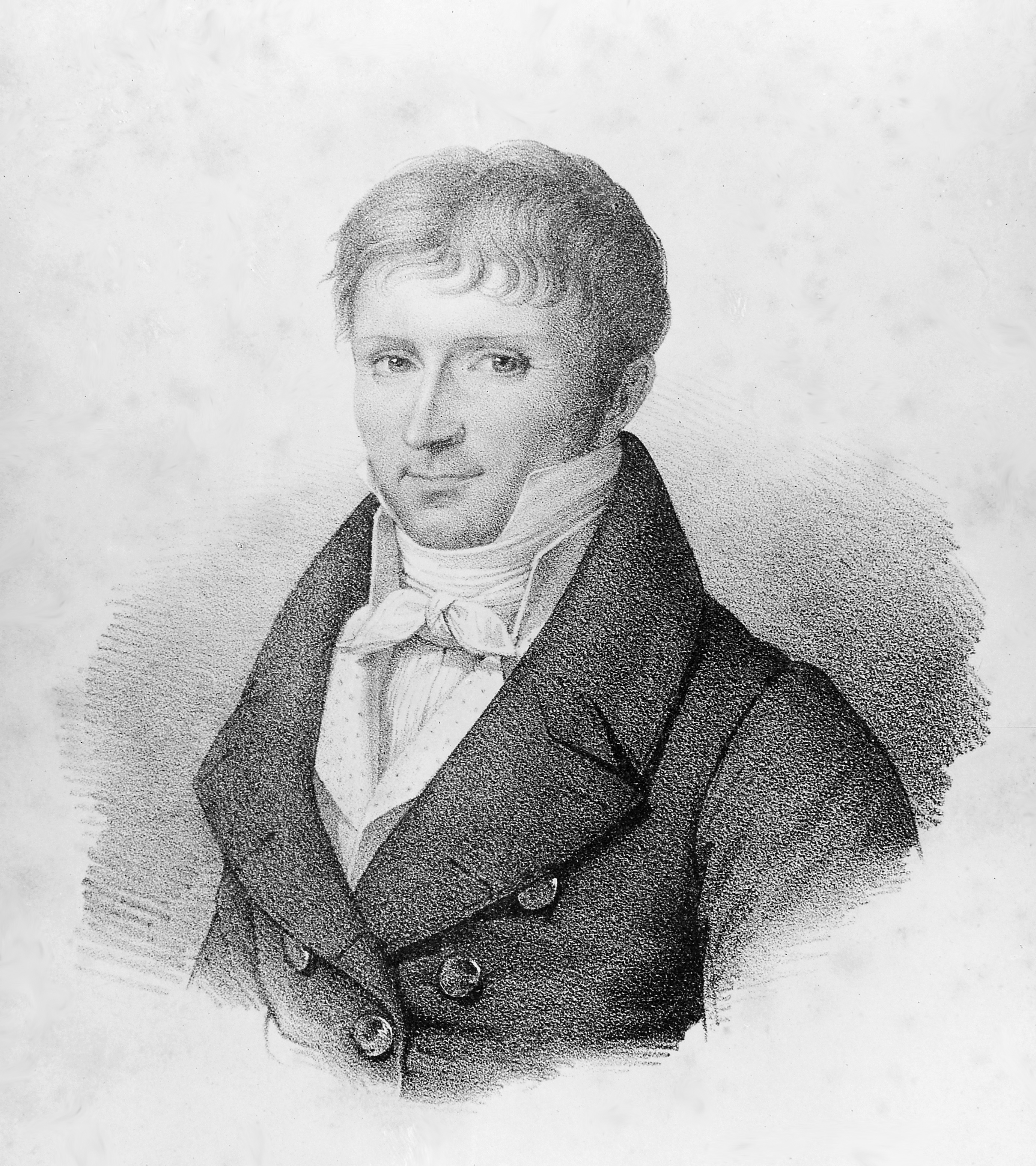 Portrait G.L. Bayle